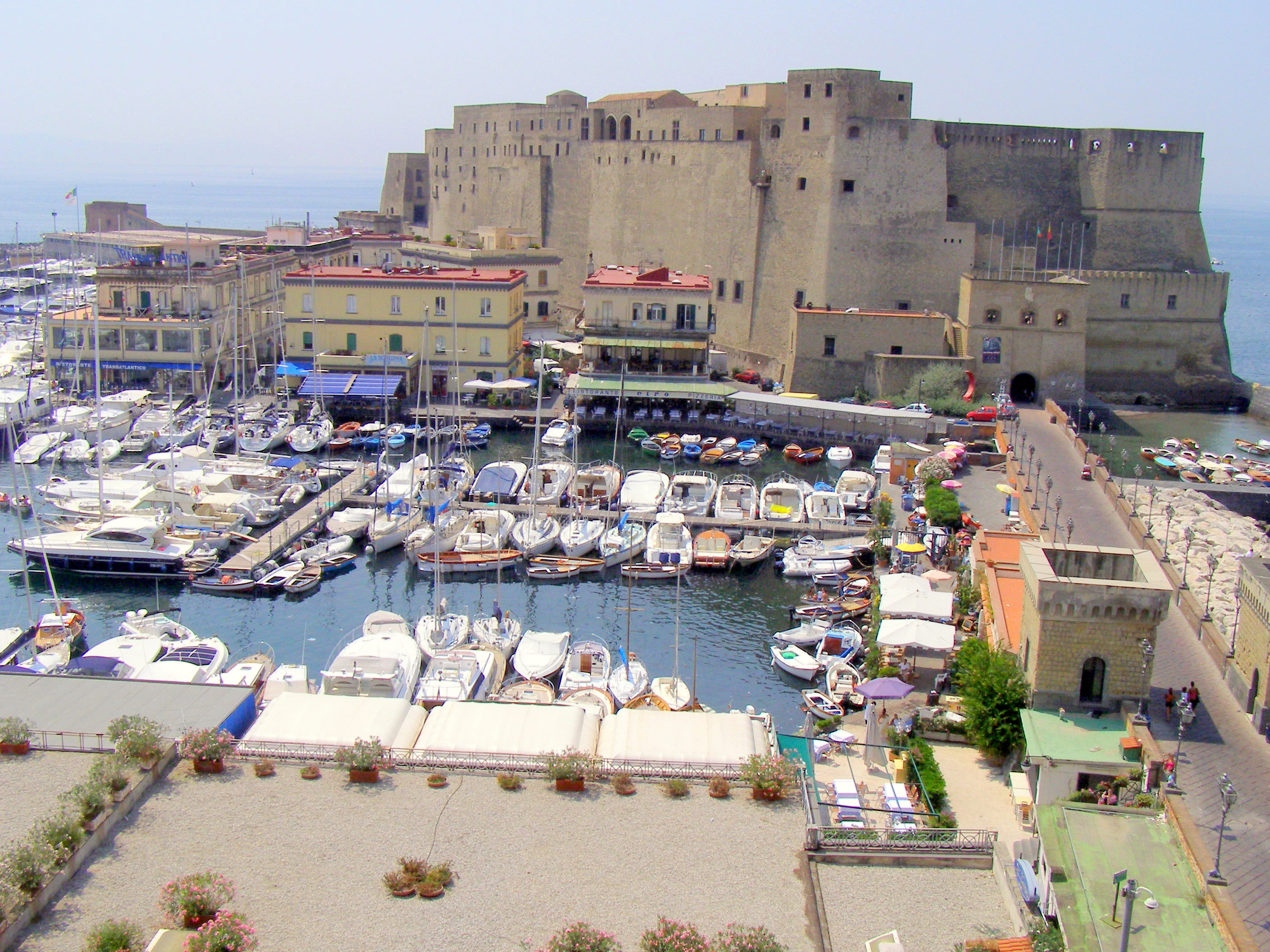 Il Castello dell'Ovo In Napoli